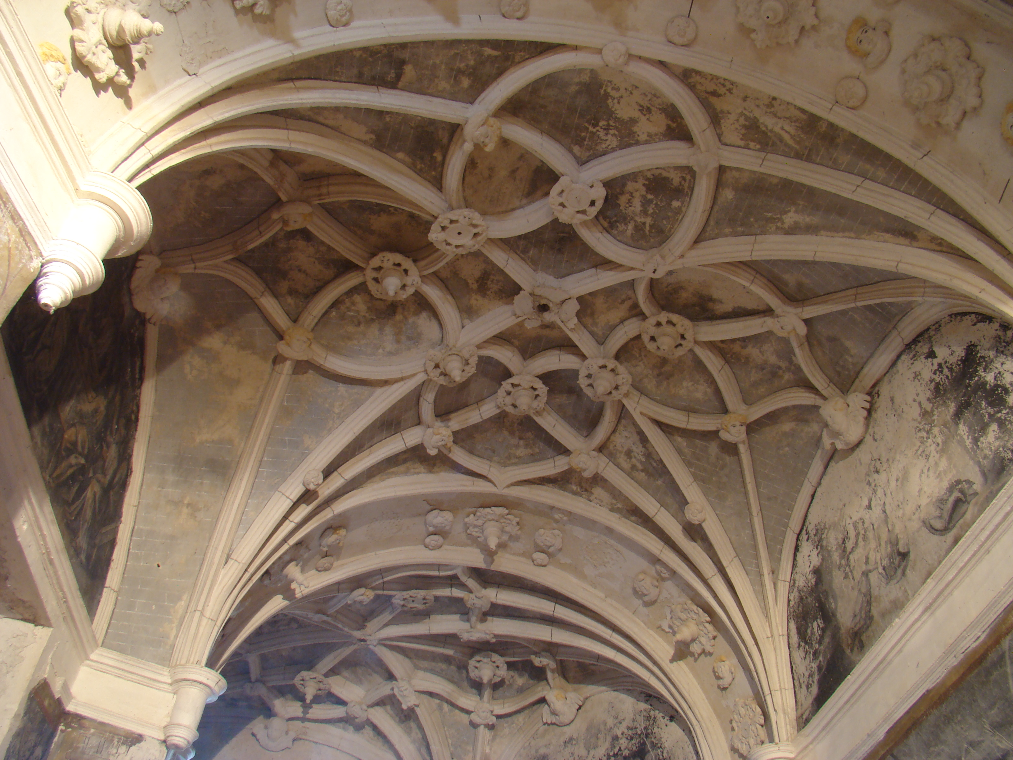 Monasterio de Palazuelos. Bóvedas góticas de la sacristía llamada comúnmente chirola. Están sin restaurar.